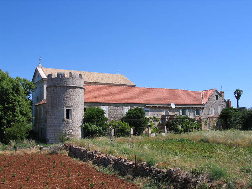 Crkva sv. Petra s dominikanskim samostanom, Stari Grad, Hvar